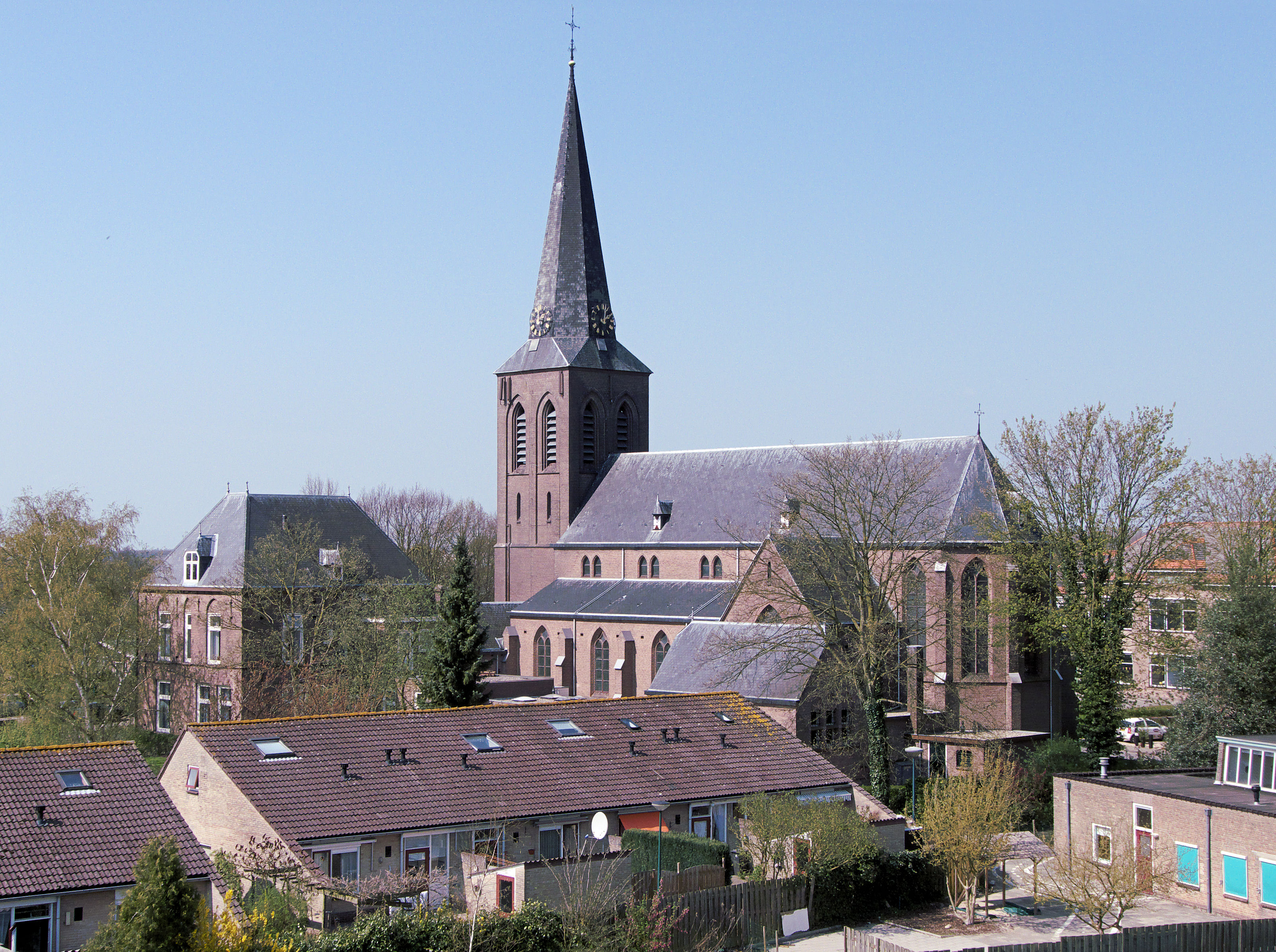 Cothen, Nederland: Rooms Katholieke kerk